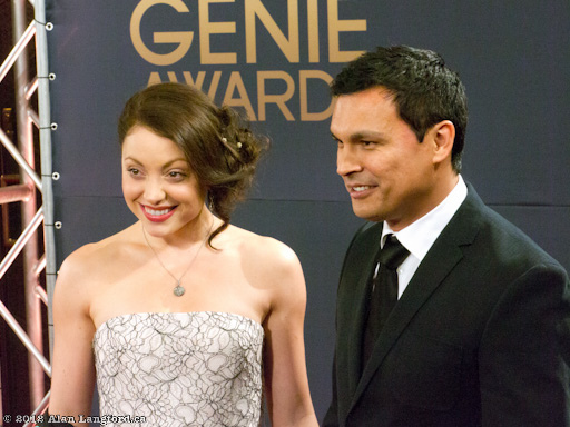 Leah Gibson, Adam Beach, Genie Awards 2012